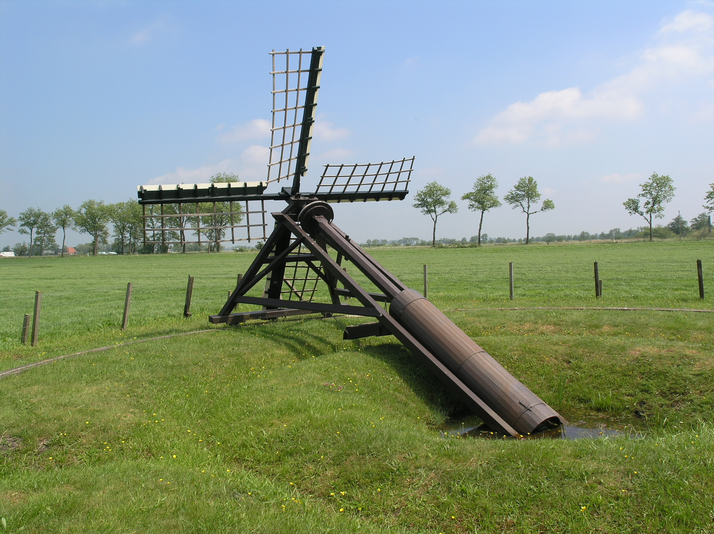 Augustinusga Boktjasker